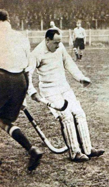 Le gardien de hockey sur gazon français Robert Salarnier (vers 1923).